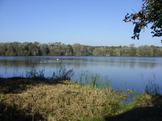 Dunger See, Naturschutzgebiet. Blick über den See vom Beobachtungsstand südlich des Sees.